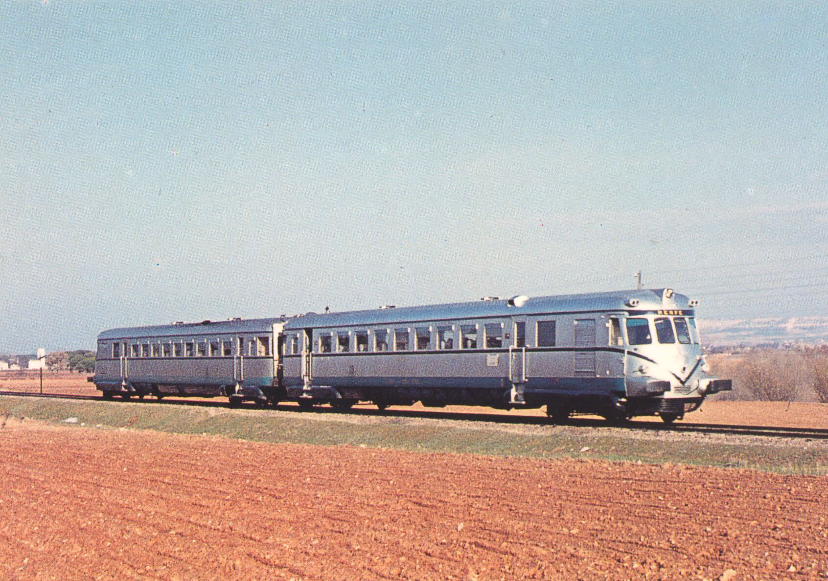 RENFE silver tram lg